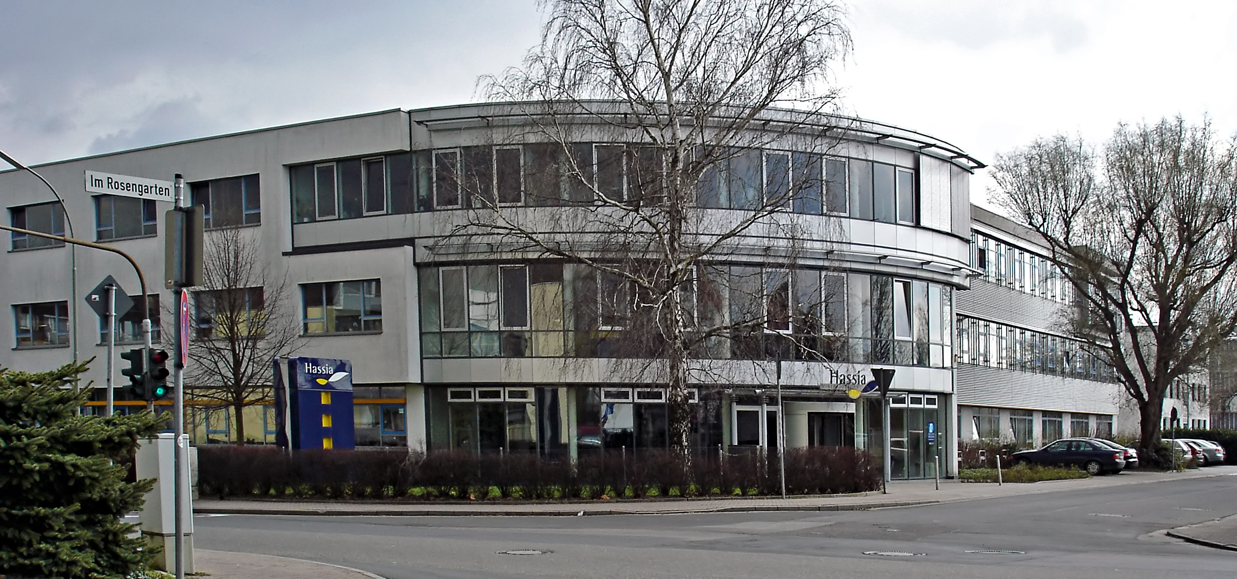 Hassia-Sprudel-Verwaltung in Bad Vilbel